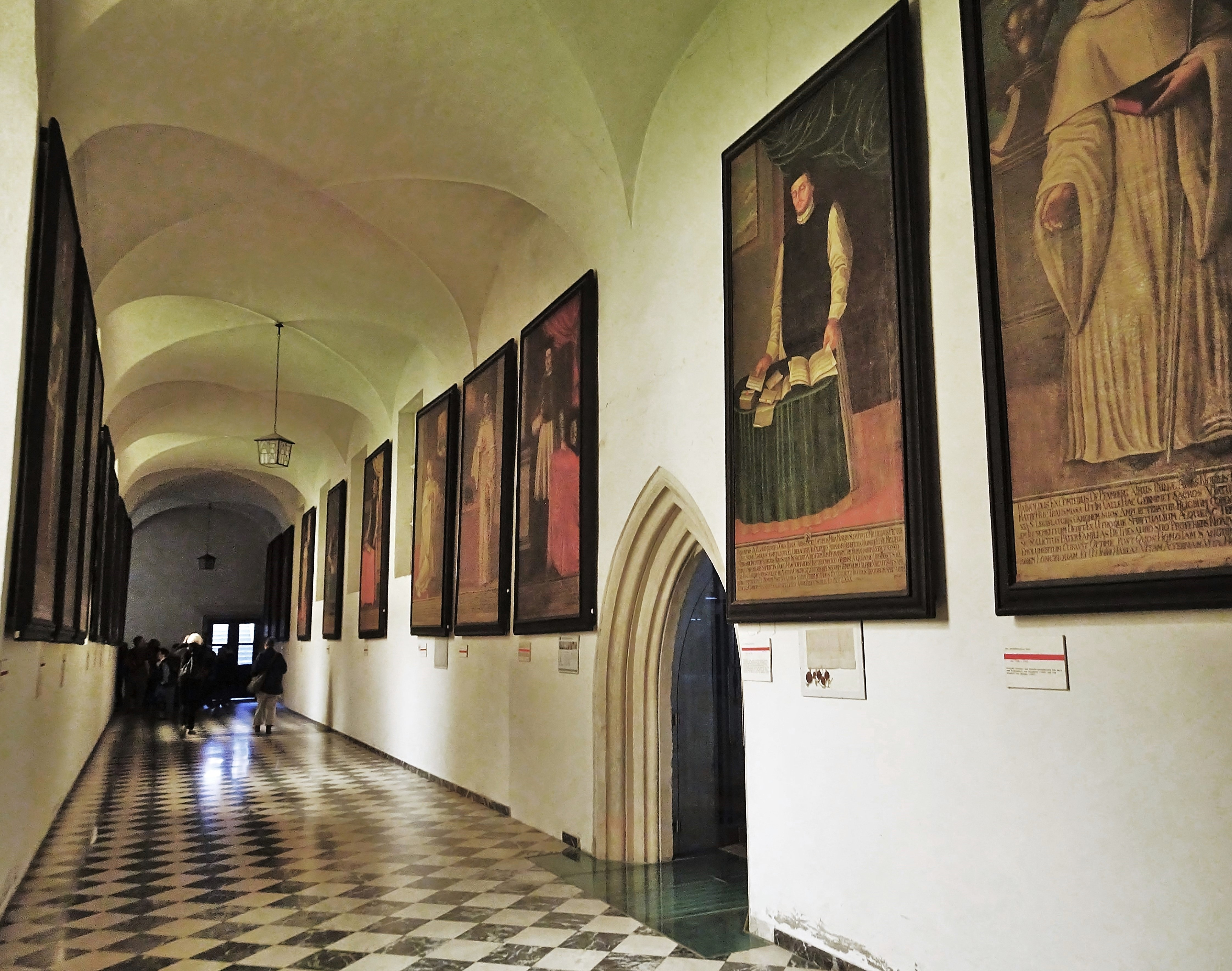 Stift Rein, Südtrakt des Kreuzganges mit Äbtegalerie und gotischem Portal zum ehemaligen Refektorium